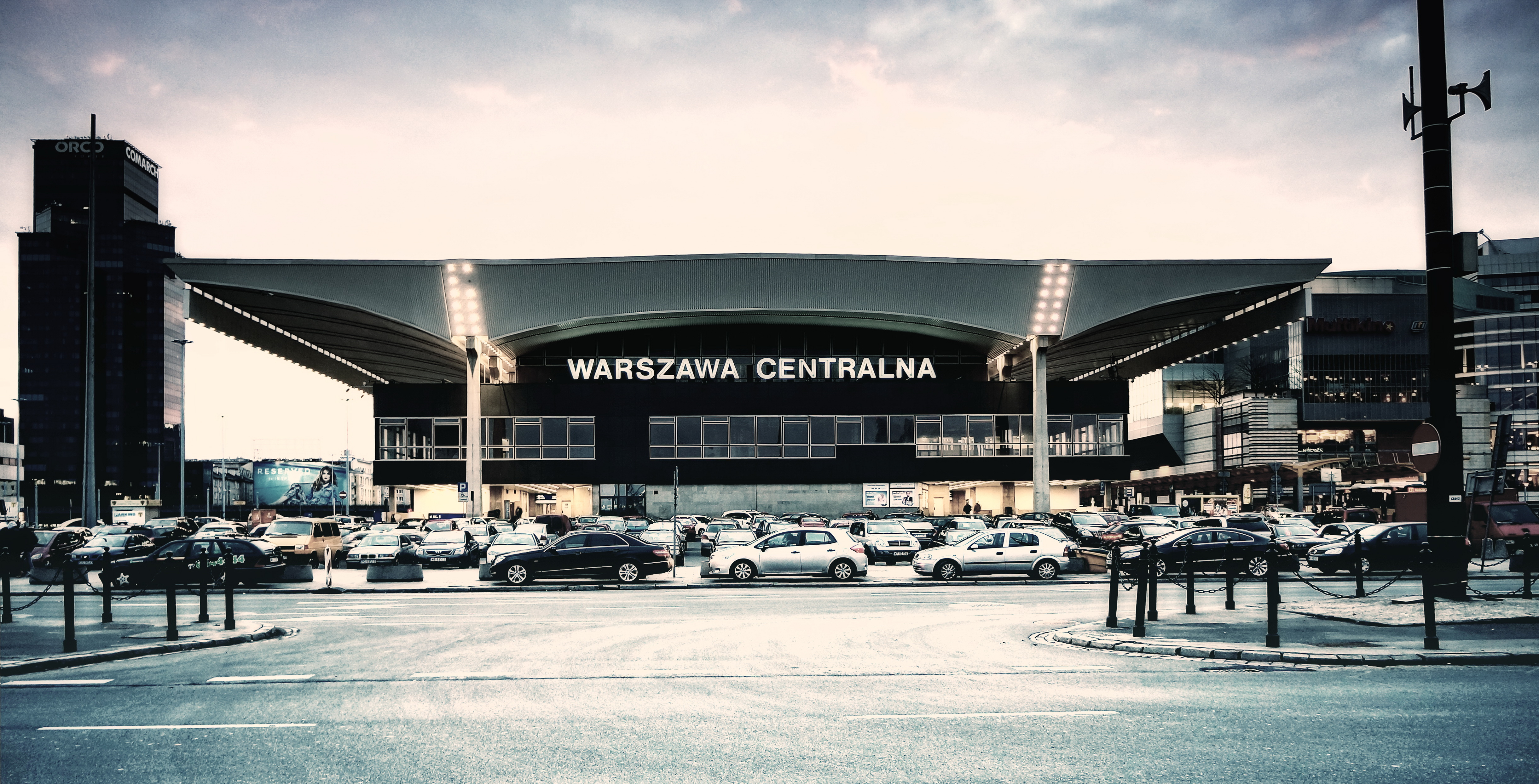 Wschodnia elewacja dworca Warszawa Centralna i fragment ulicy Emilii Plater